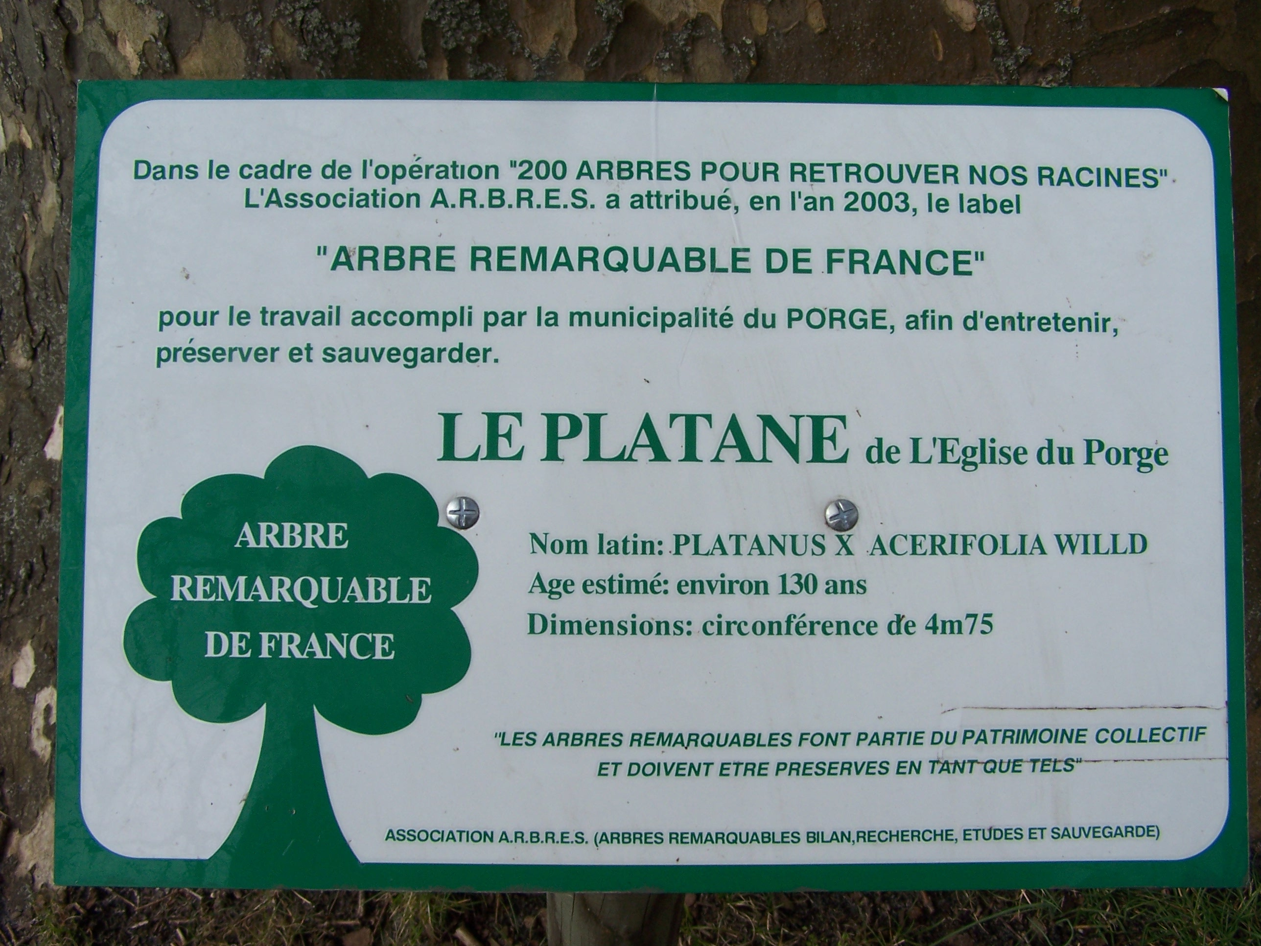 Panneau d'information du platane, arbre remarquable au Porge, Gironde, France